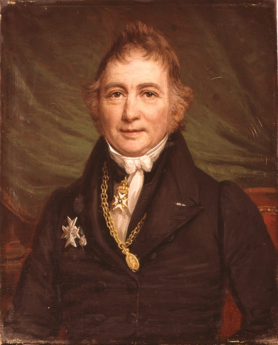 Avbildet på norske ti-krone sedler.